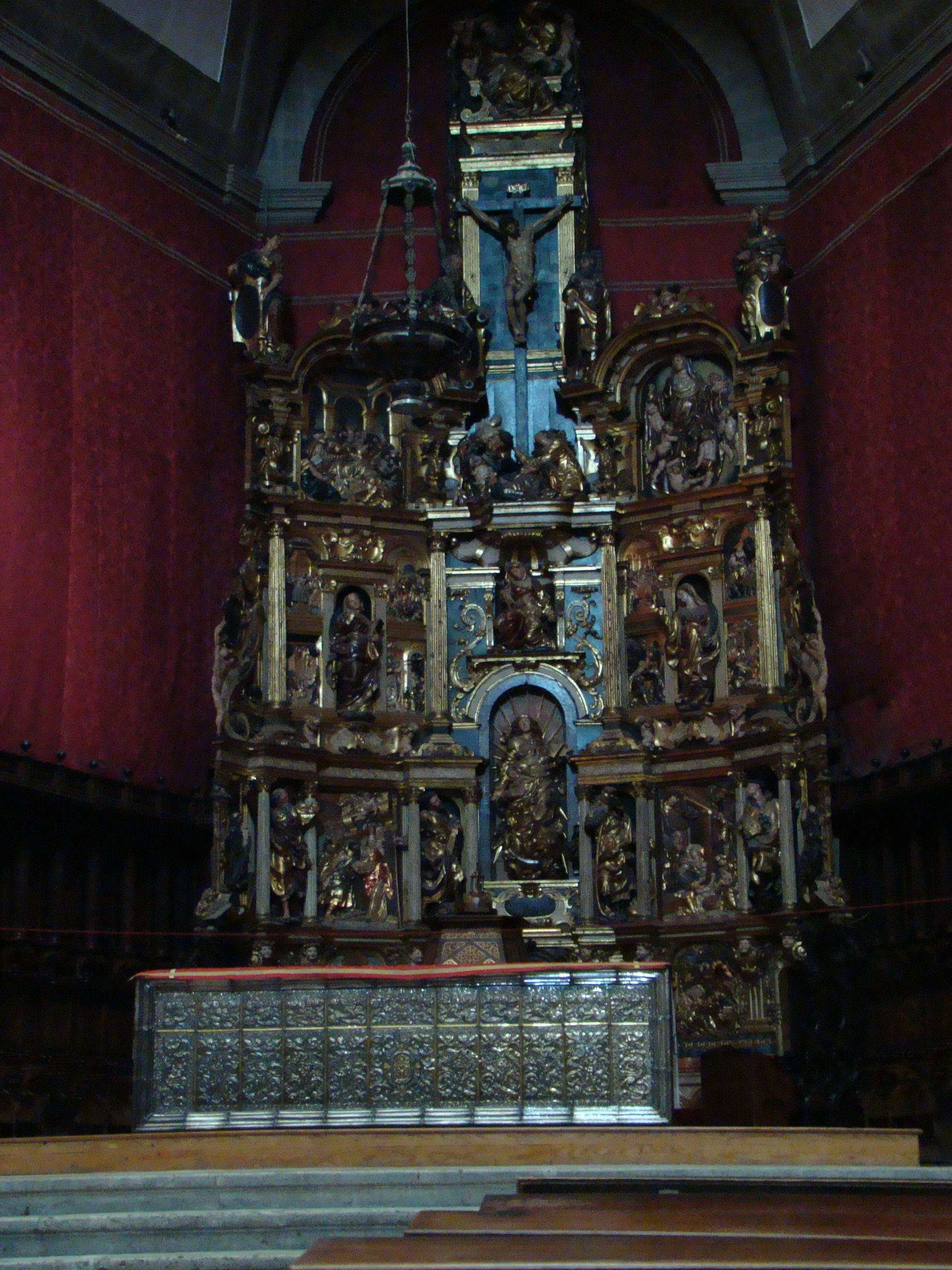 Retablo mayor de la catedral de Valladolid, obra de Juan de Juni. Pertenecía a la iglesia de La Antigua. Fue necesario sacarlo de allí por motivo de las obras que se iban a realizar en esta parroquia en 1922.